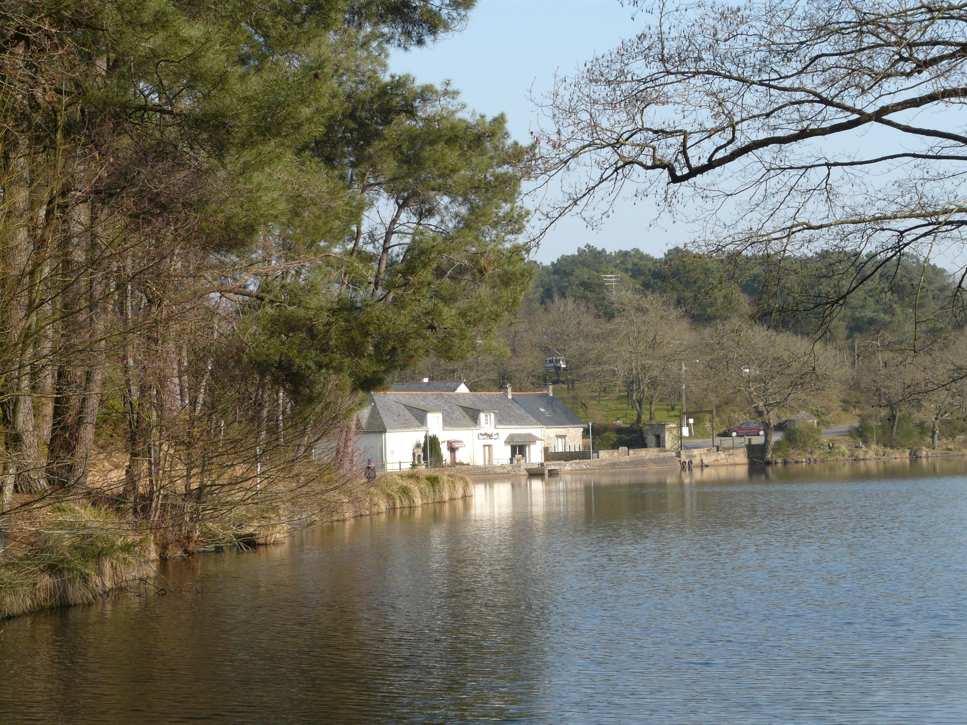 L'étang de la Roche vu de la berge Nord